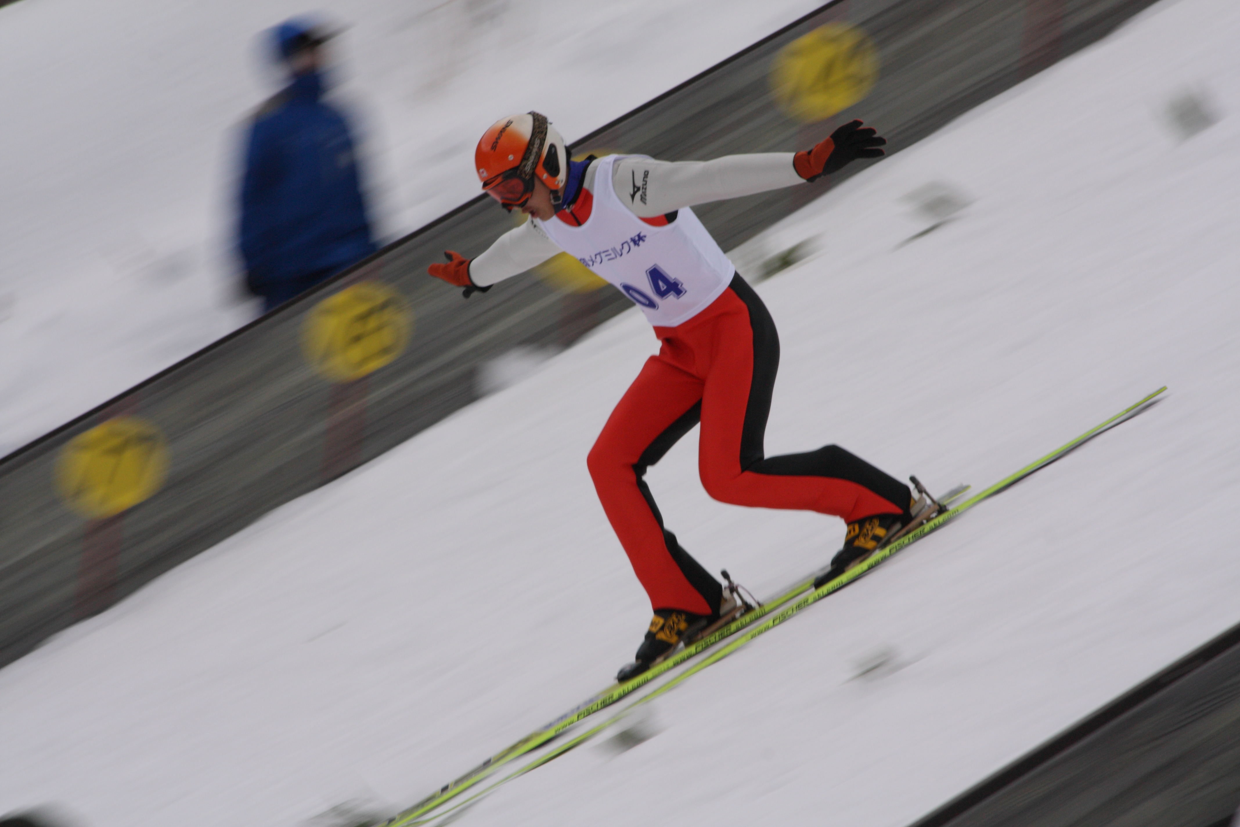 Ski jumper doing a Telemark landing in Miyanomori ski jumping hill in Sapporo, Japan